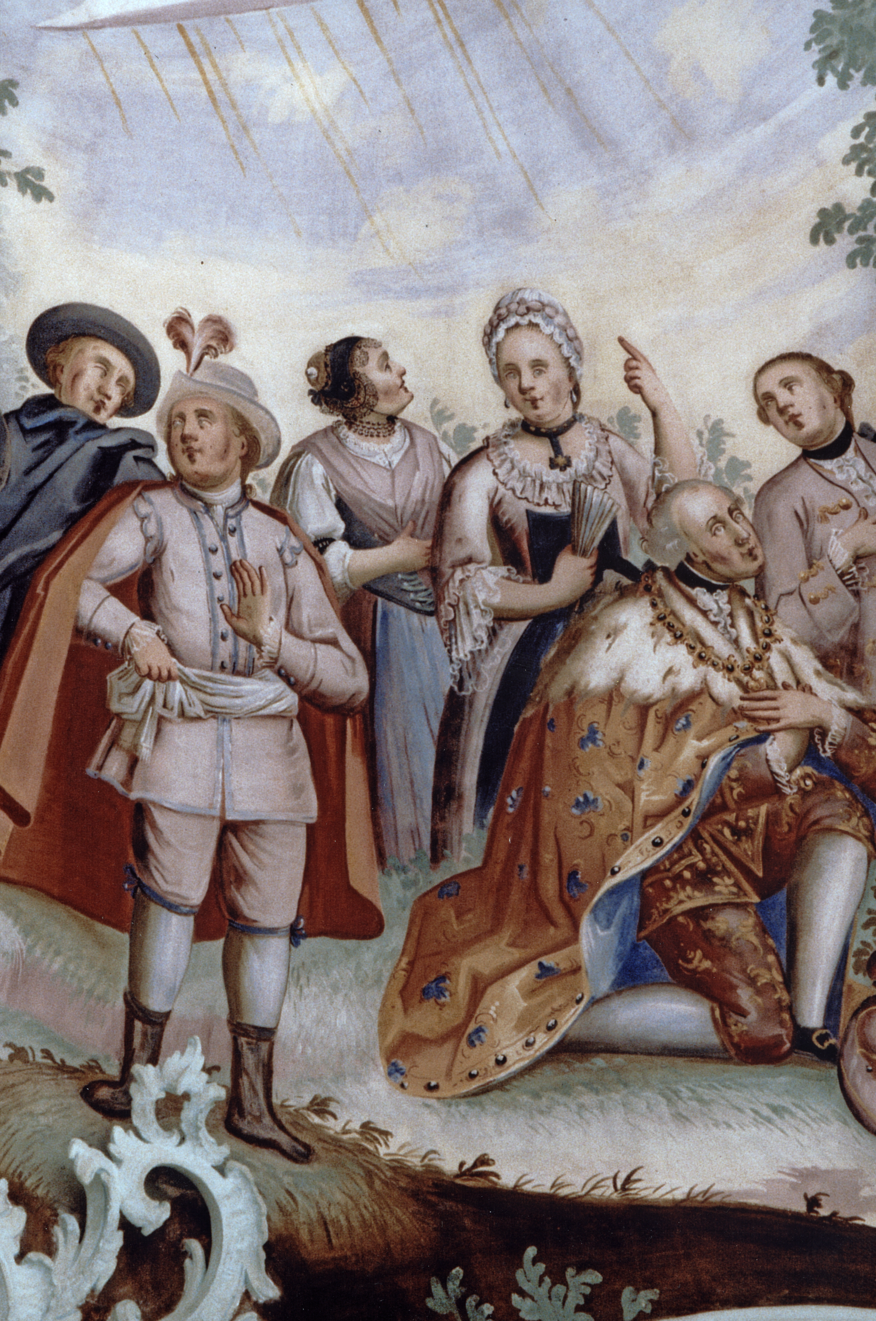 Ursula Wolf-Zellweger im Chorgemälde in der Reformierten Kirche Trogen, Detailaufnahme auf dem Erdkreis "Europa"